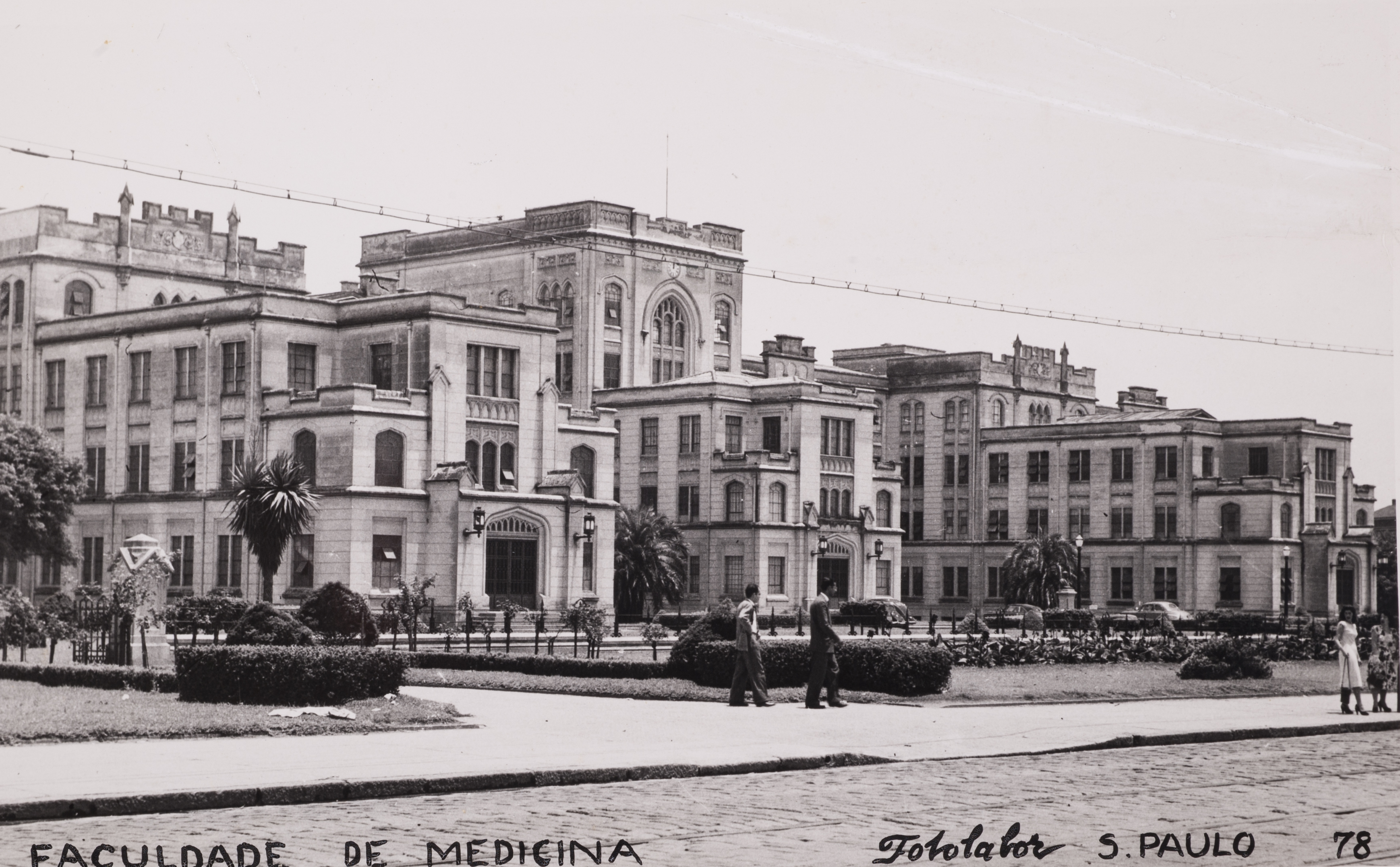 Obra que integra o acervo do Museu Paulista da USP. Coleção Werner Haberkorn - CHW